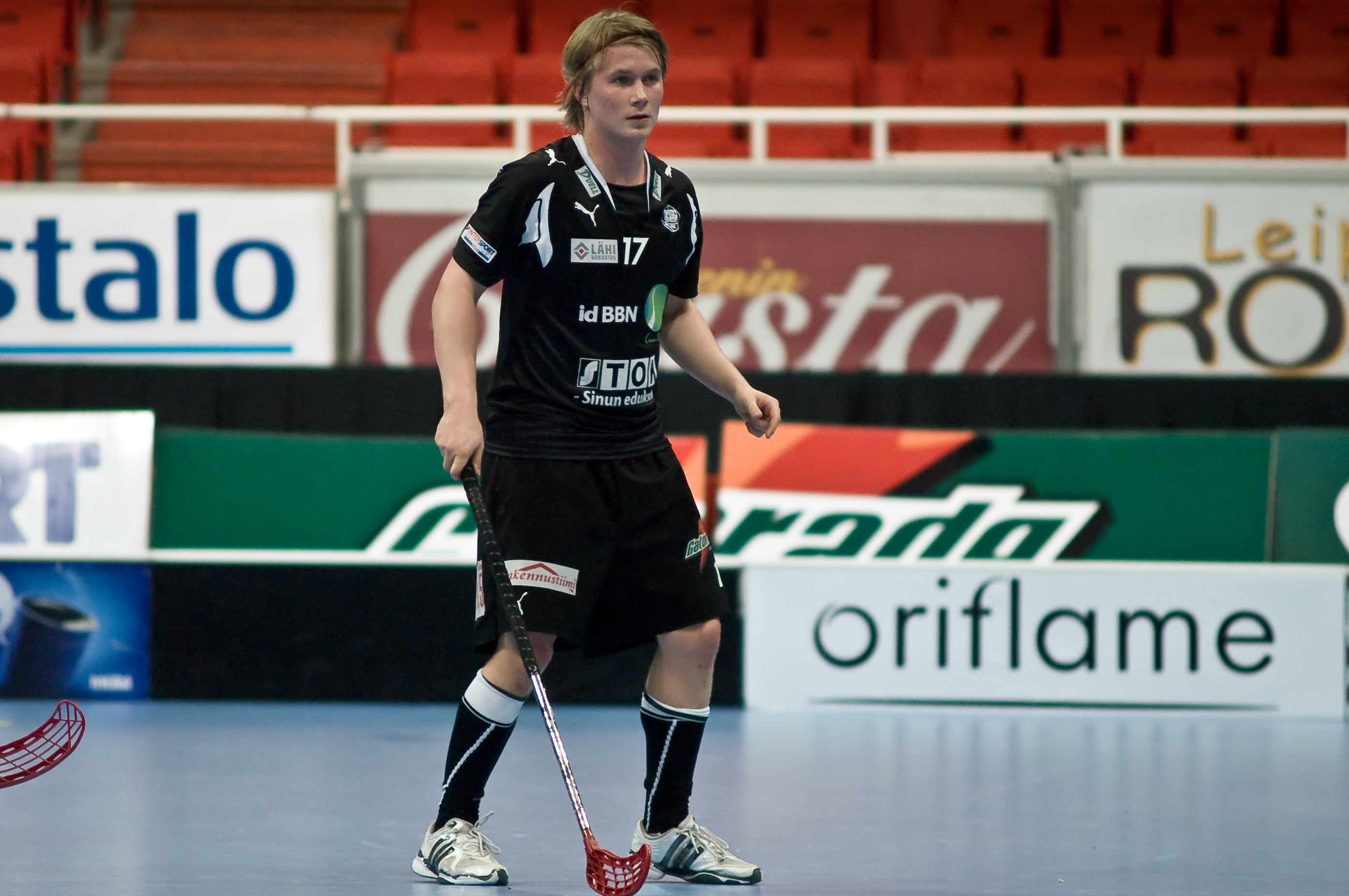 Salibandypelaaja Lasse Paju TPS:n paidassa kaudella 2008-2009